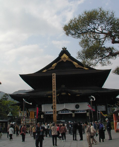 信州善光寺 御開帳時の本堂（長野県長野市）撮影者：Ans 2003.05.12